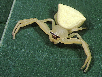 female Thomisus kitamurai from Okinawa.